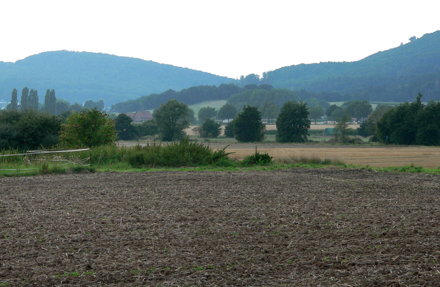 Steinberger Pass zwischen Hirschkuppe links und Messingberg rechts